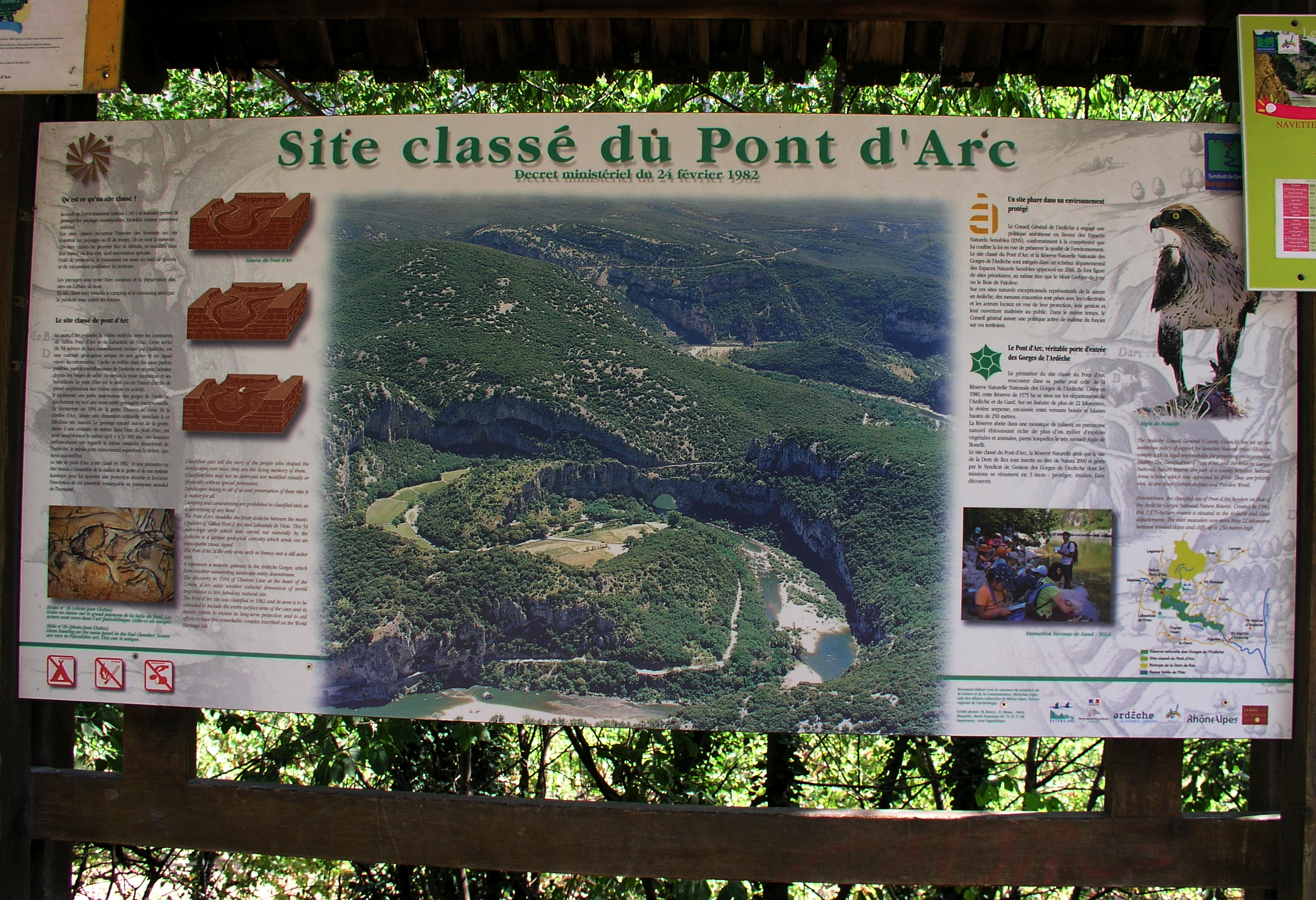 Panneau explicatif du Pont d'Arc (Ardèche)